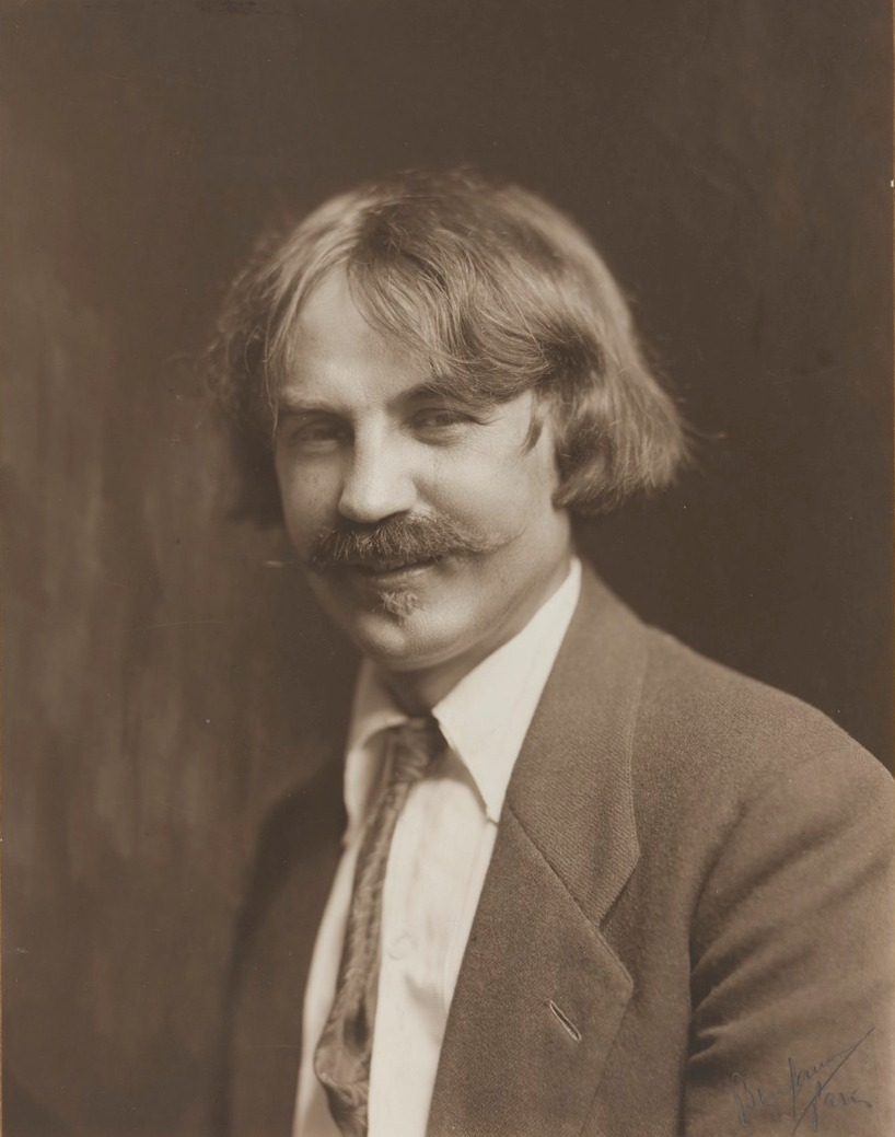 Bolesław Biegas